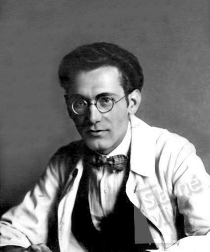 Ludvík Hilgert (1895-1967), český architekt